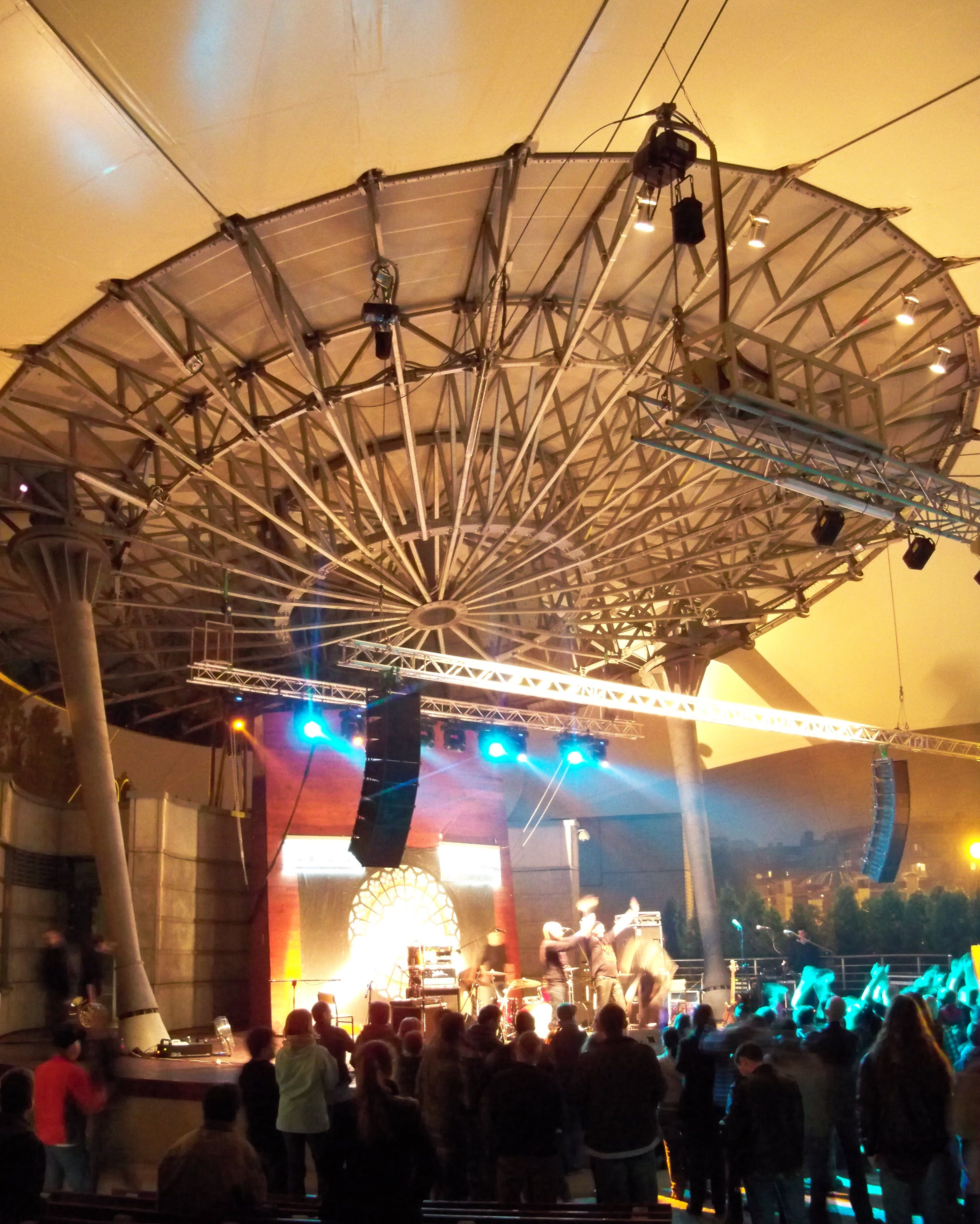 Koncert zespołu Armia w Amfiteatrze w Parku Górczewska w Warszawie z okazji Dnia Wolnego Wyboru, 4 czerwca 2012